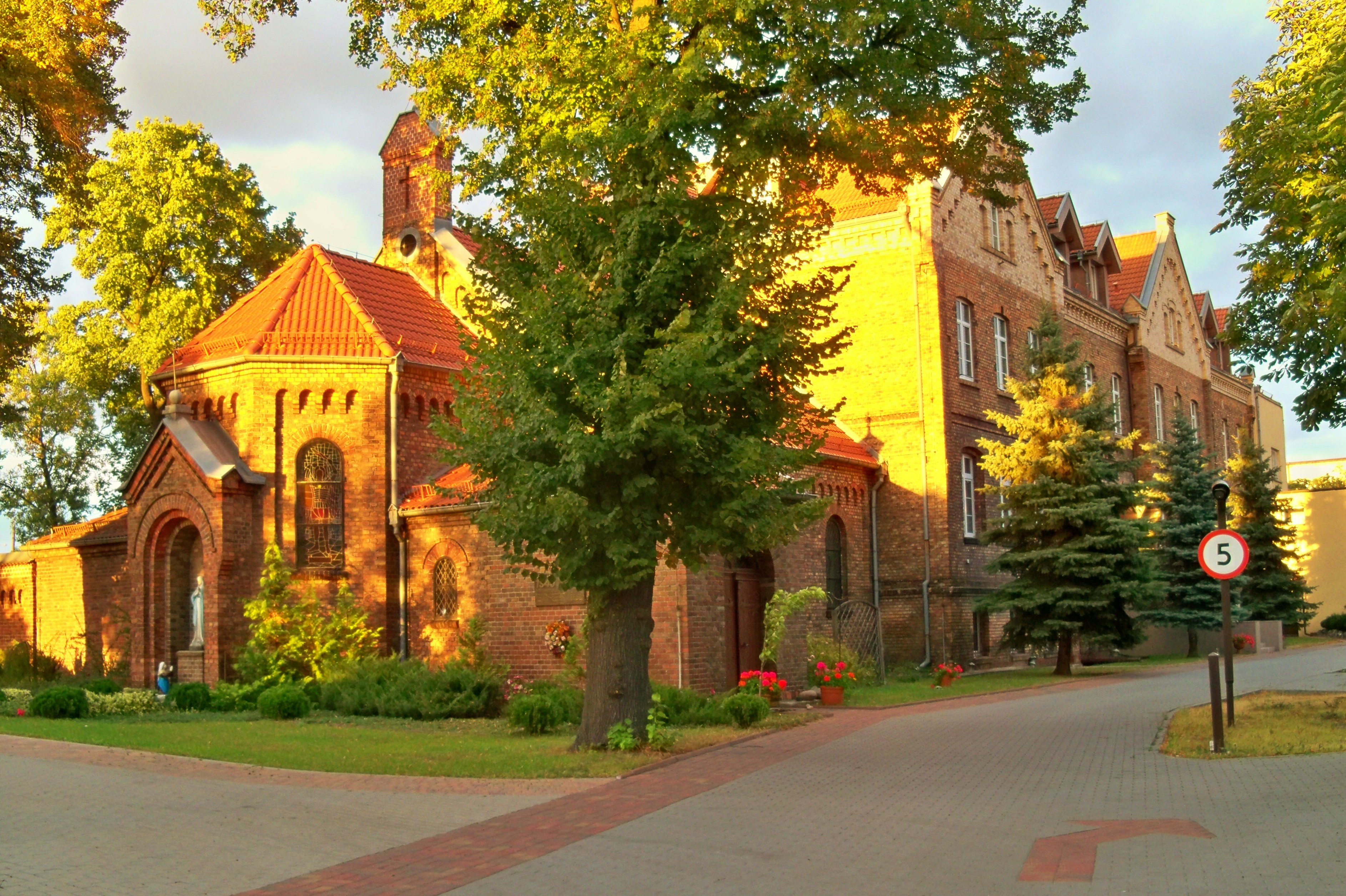 Klasztor Sióstr Pasterek od Opatrzności Bożej w Poznaniu – ul. Piątkowska 148